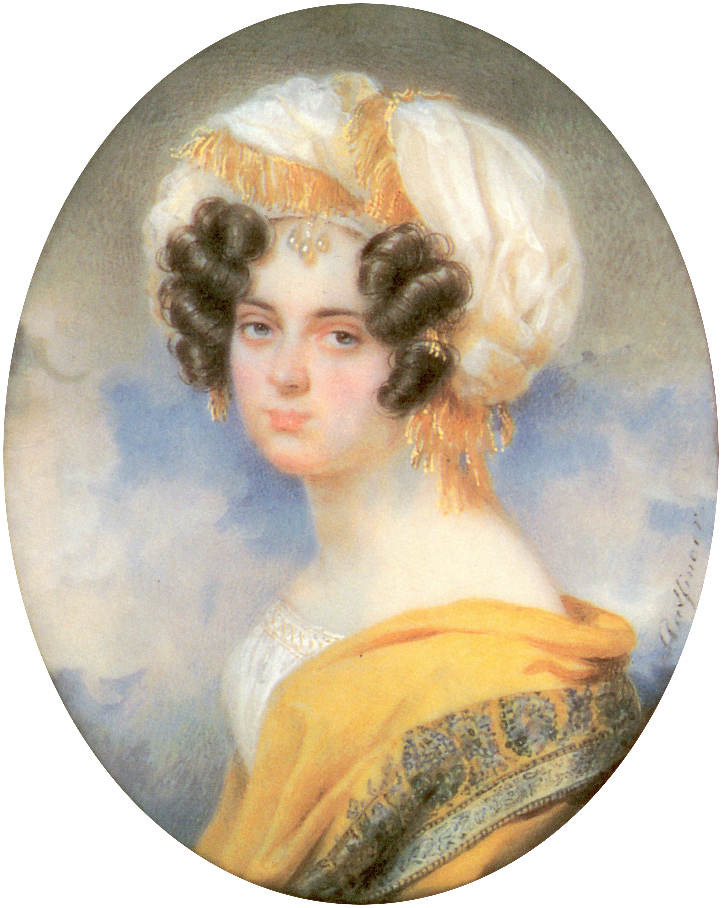 Portrait of Maria Musina-Pushkinalabel QS:Lru,"Мусина-Пушкина Мария Александровна" label QS:Len,"Portrait of Maria Musina-Pushkina"